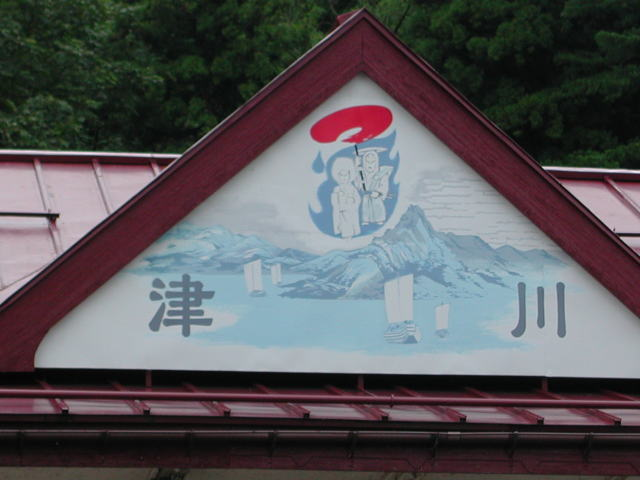 JR津川駅